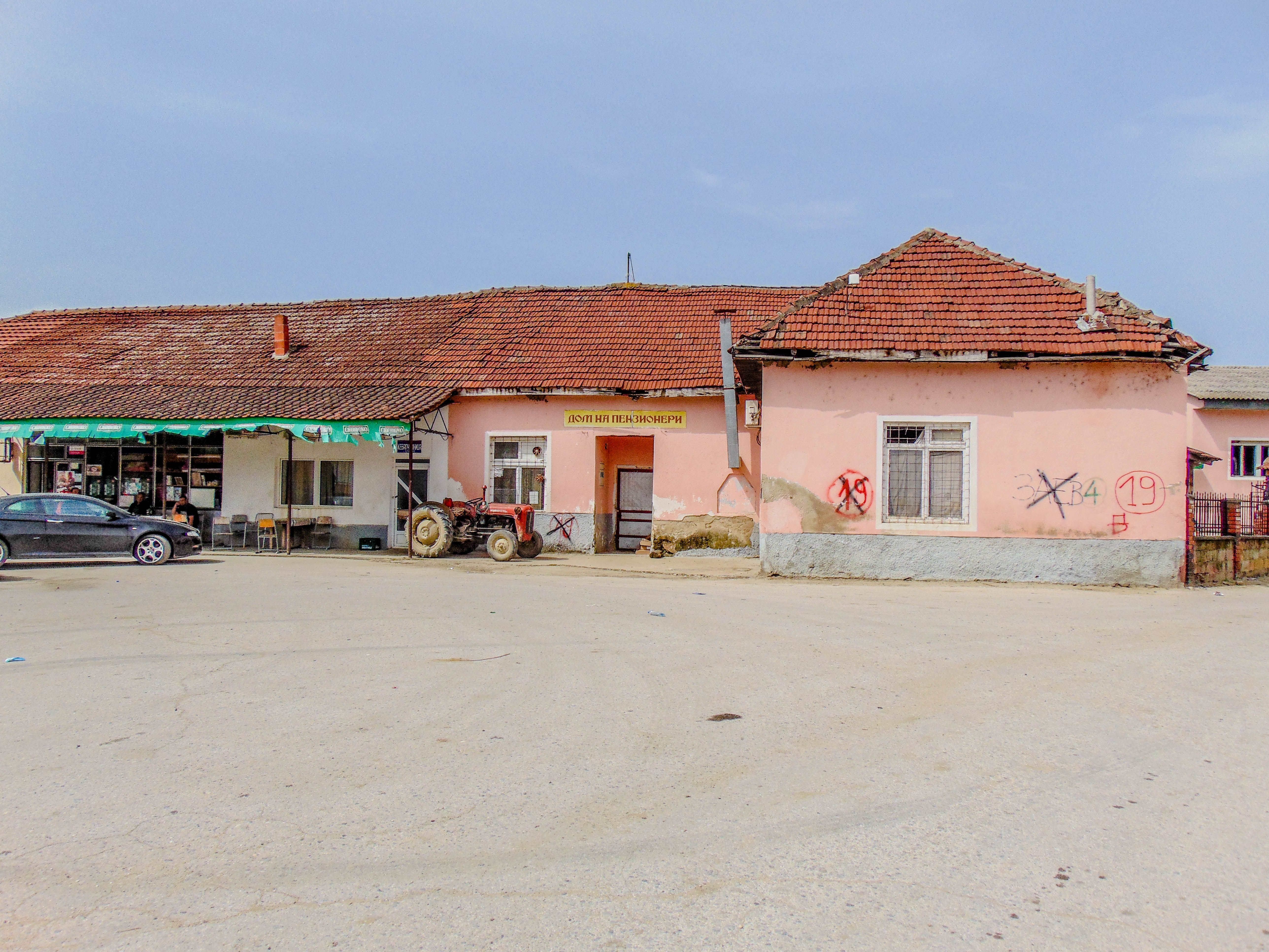 Дом на пензионери